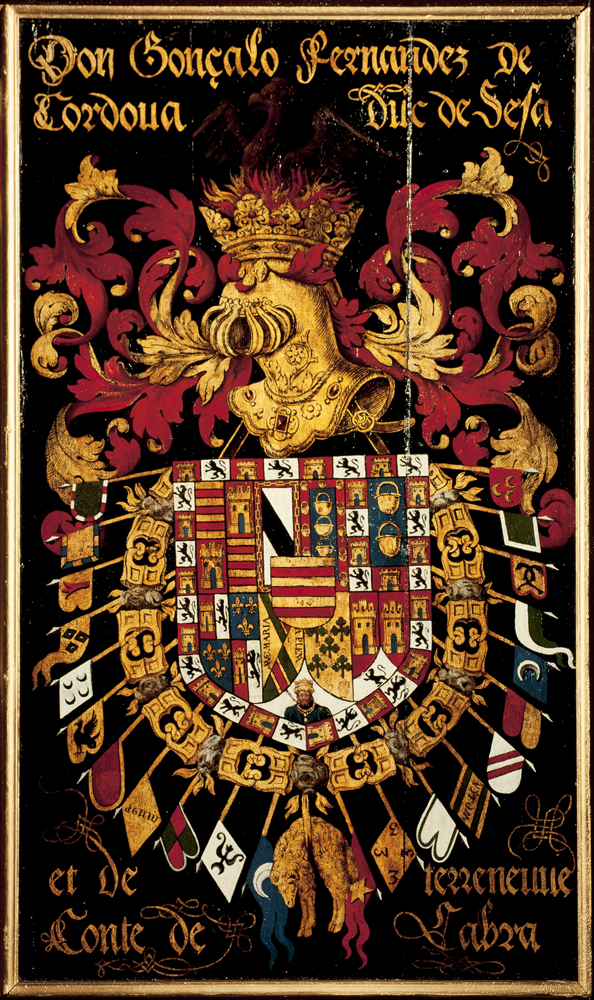 coat of arms of Gonzalo II Fernandez de Cordoba, 3rd duke of Sessa (1520–1578) schilder uit Valenciennes; vermoedelijk Jacques Le Boucq, Blazoen van het 23ste Gulden-Vlieskapittel, 1559, GonÃ§alo Fernandez de Cordovainv: 433 N.217